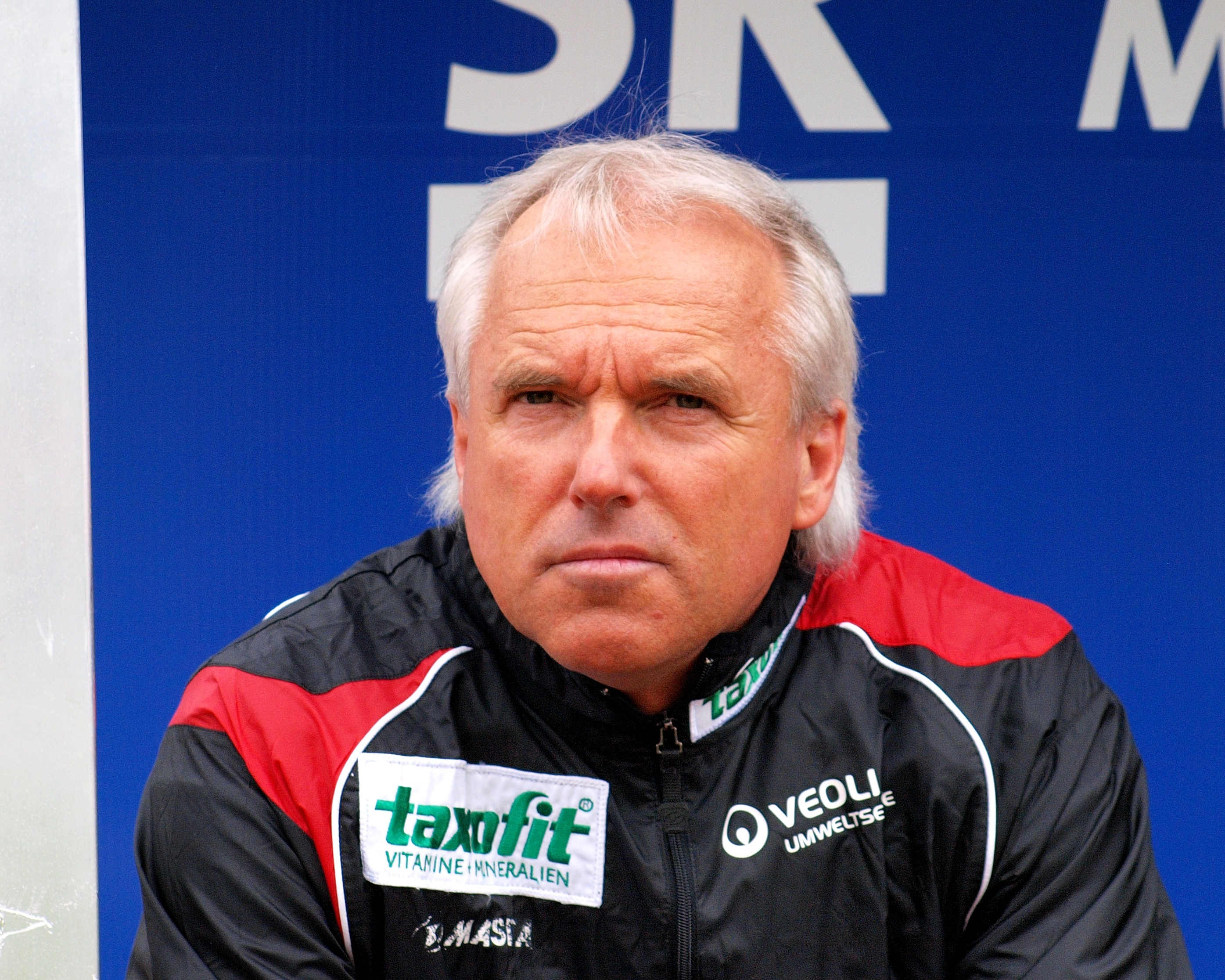 Peter Vollmann vor dem Spiel des 1.FC Saarbrücken gegen den FC Hansa Rostock.